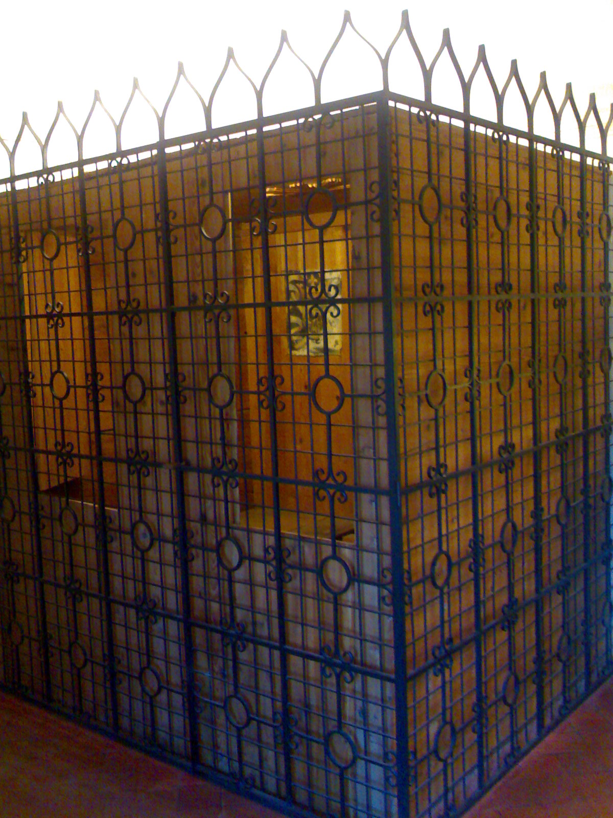 Foto della Cella di San Giuseppe da Copertino a Osimo